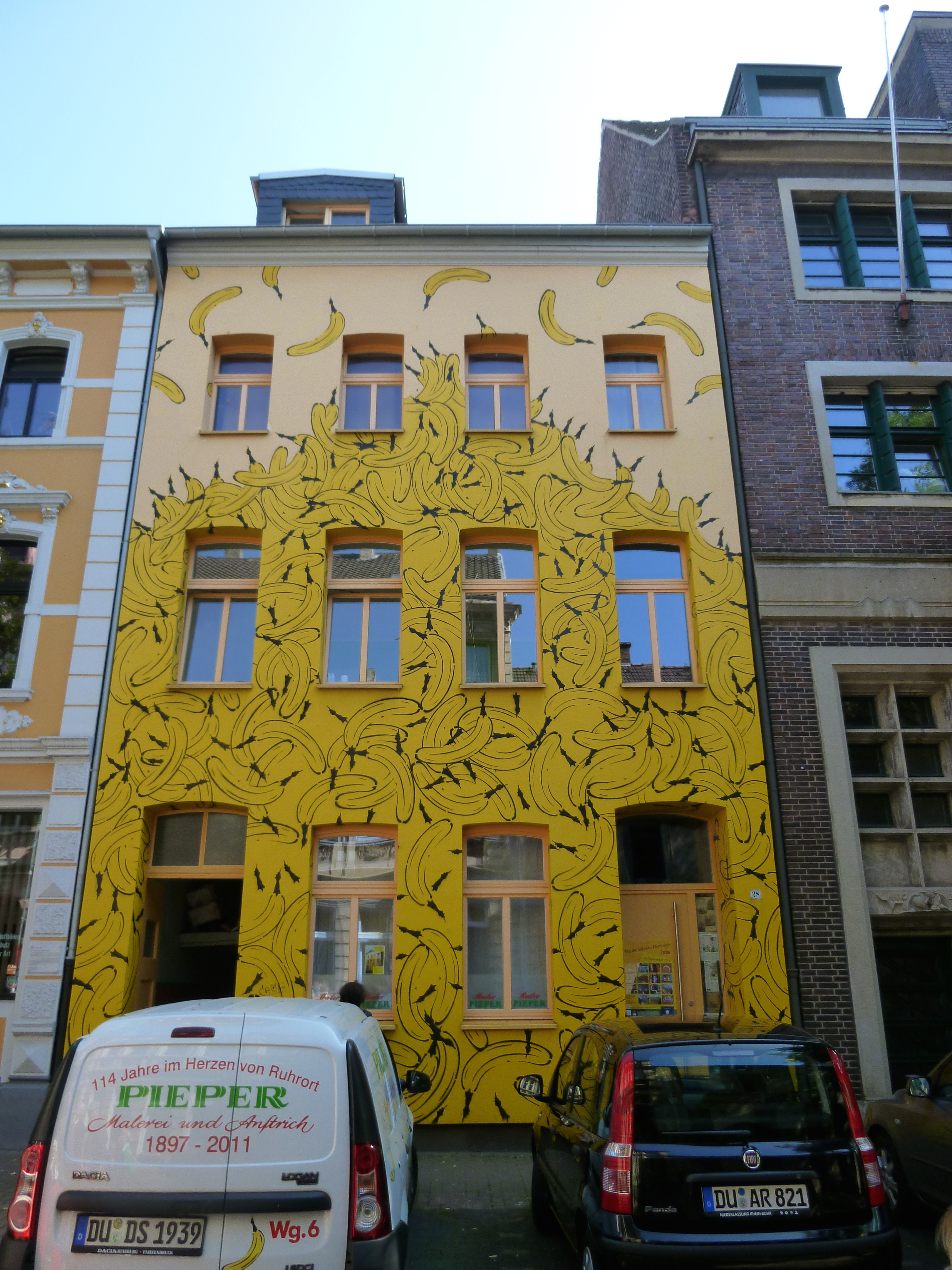 Banenenhaus, Duisburg-Ruhrort